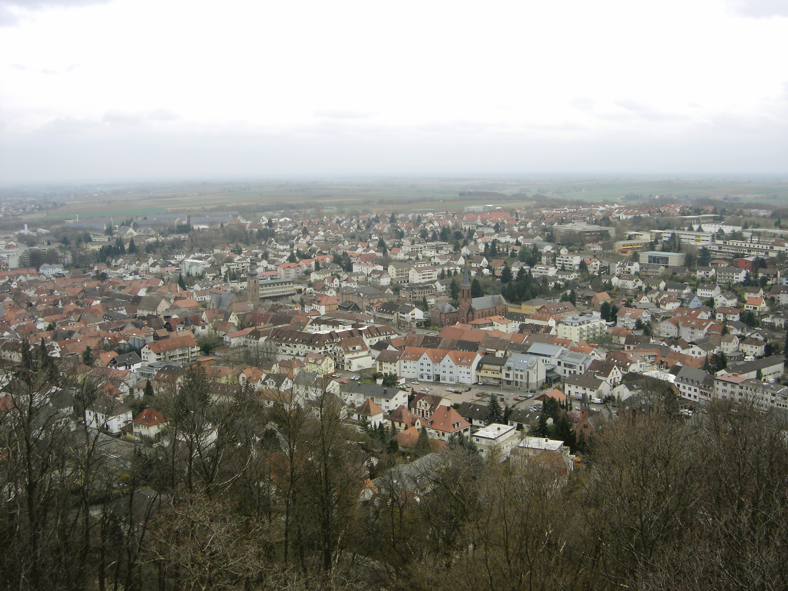 Bad Bergzabern in Rheinland Pfalz (Deutschland). Eine Beschreibung des Bildes befindet sich im Dateinamen.